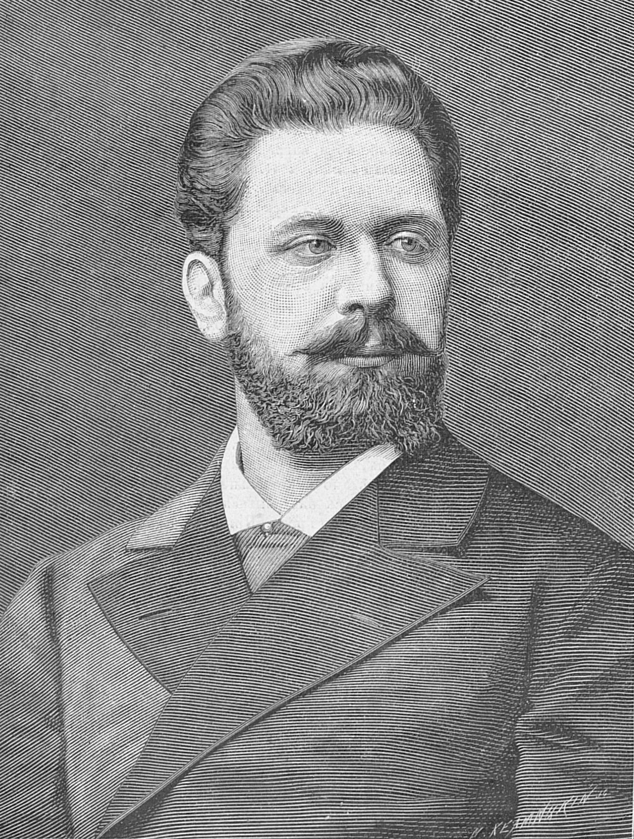 Прянишников Ипполит Петрович, русский оперный певец (баритон), режиссёр, педагог